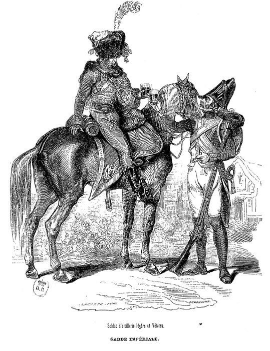 Soldat d'artillerie légère et vétéran